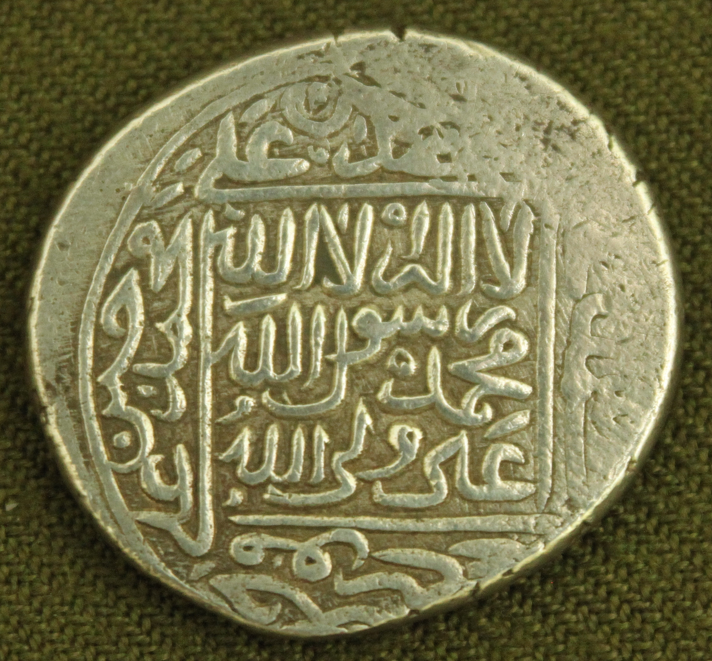 Сефевиды шах Исмаил Хатаи, серебряная монета, 1506 год.